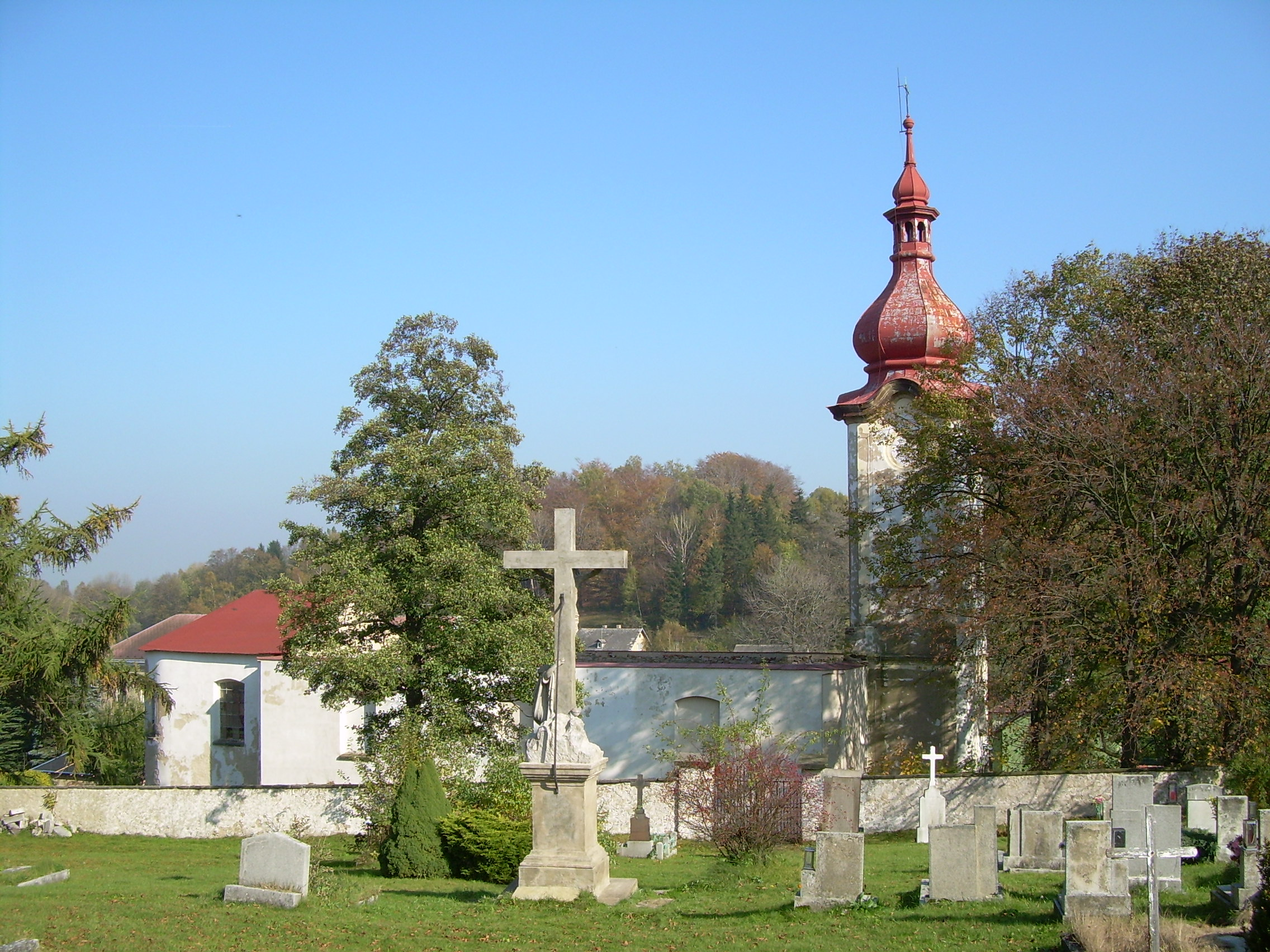 Kostel sv. Mikuláše v Petrovicích na Ústecku